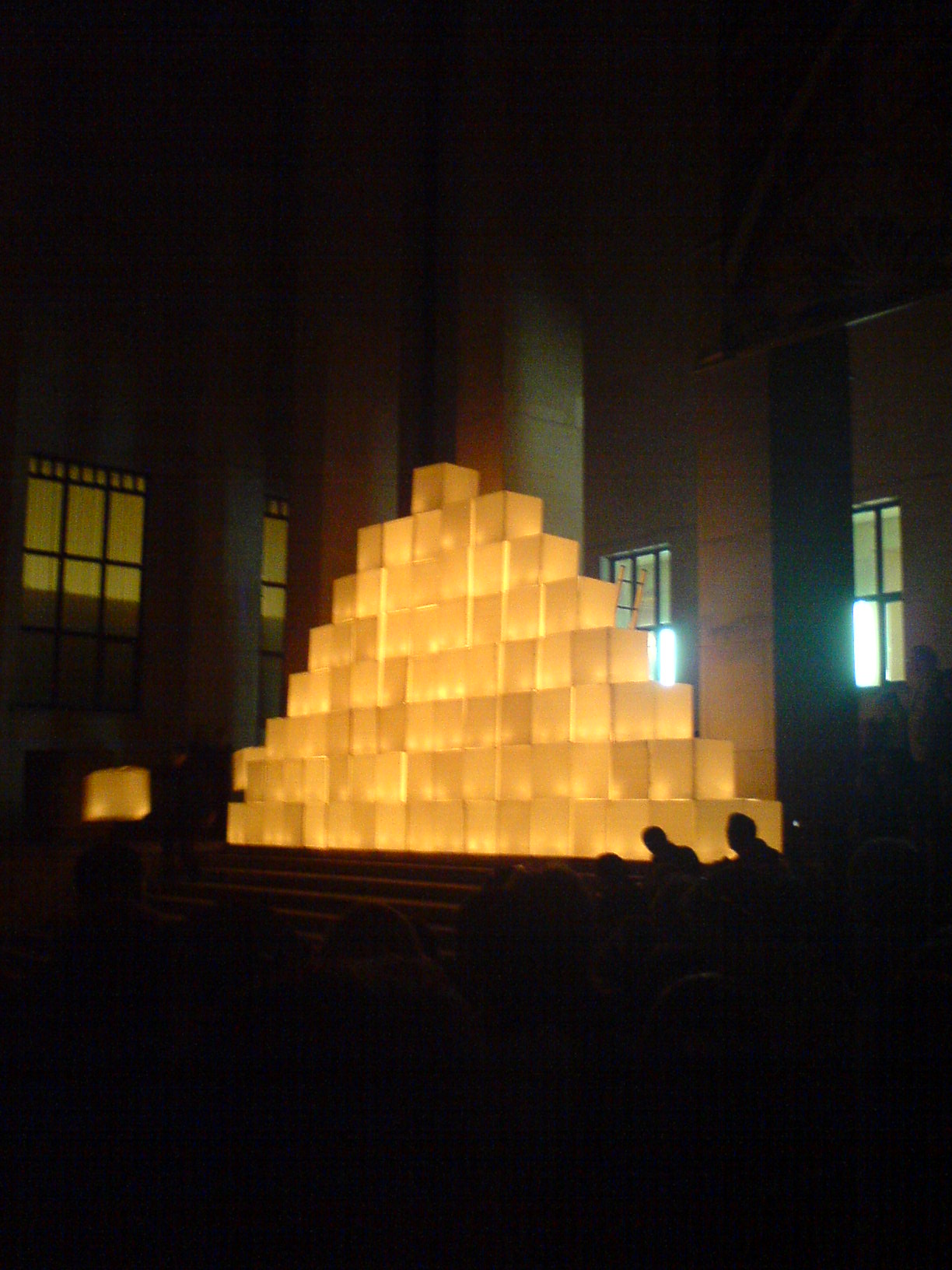 PL, Warszawa, Muzeum Narodowe, spektakl Akademii Ruchu "Światło i ciążenie" (piramida)